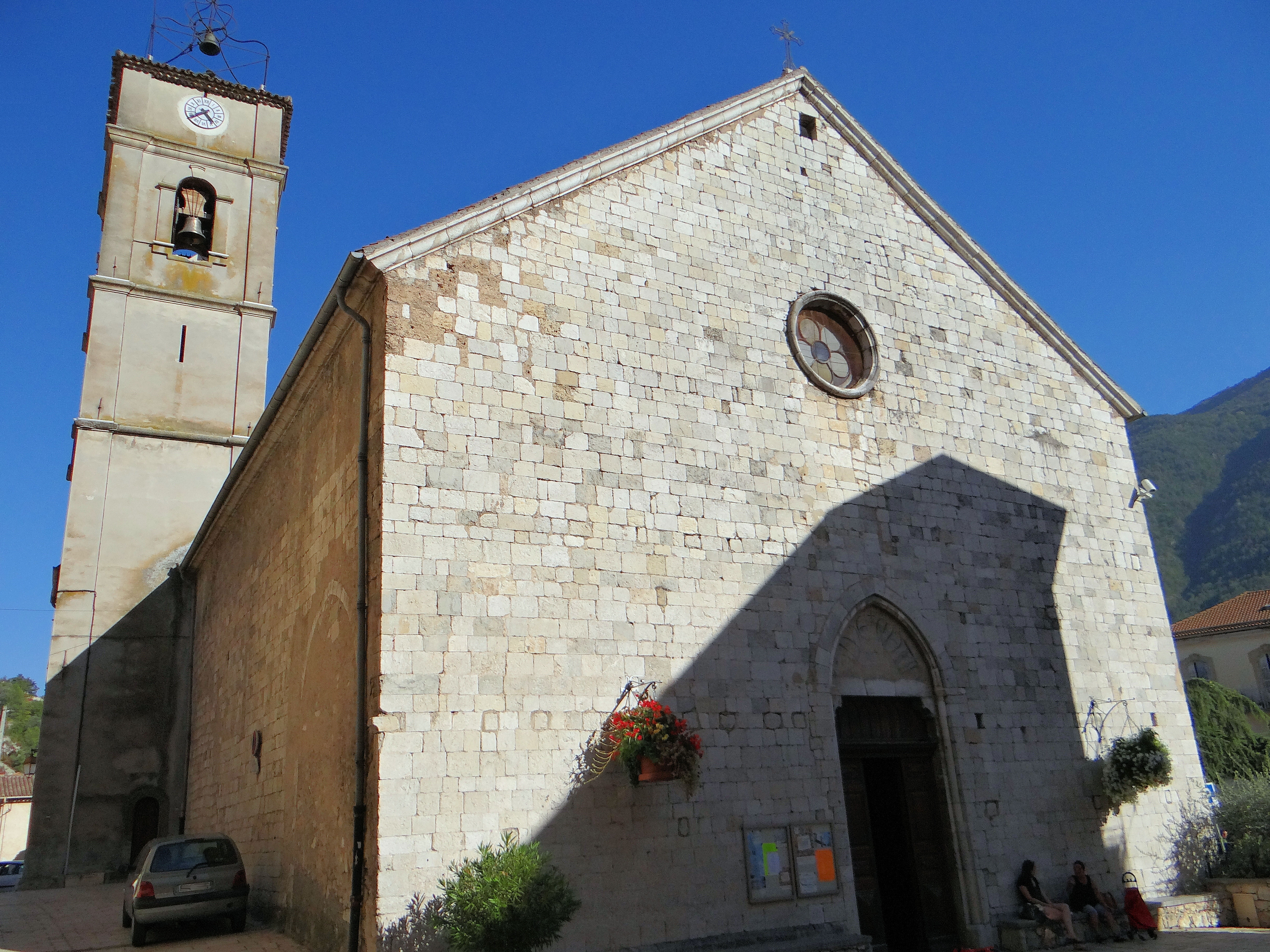 Puget-Théniers - Église Notre-Dame-de-l'Assomption - Façade et clocher